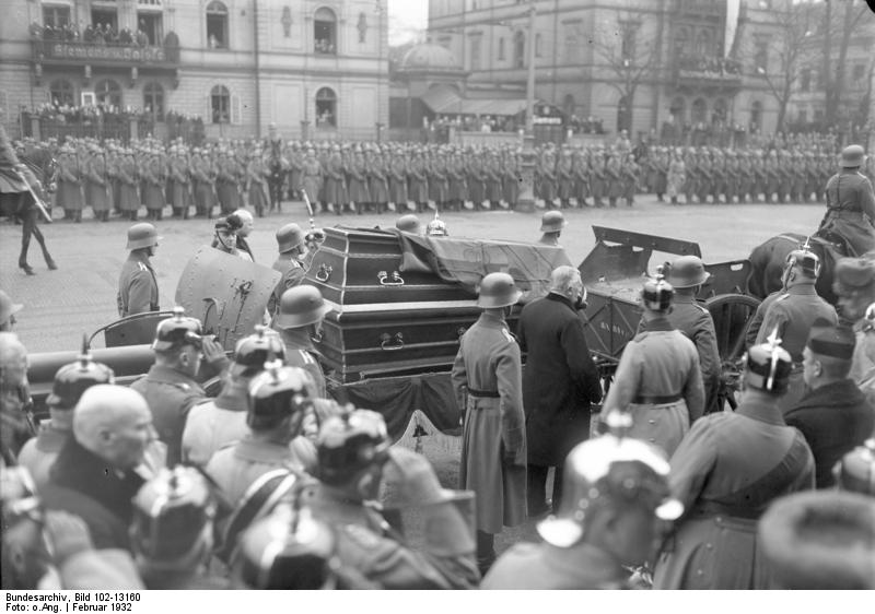 Die feierliche Beisetzung des Exkönig Friedrich August III von Sachsen in Dresden ! Eine Traditionskompagnie der Reichswehr stellte das Ehrengeleit. Hinter dem Sarge folgten die drei Söhne des Verstorbenen sowie der Exkronprinz Ruprecht von Bayern. Der mit der Königstandarte geschmückte Sarg auf der Laffette nach der feierlichen Einholung vor dem Hauptbahnhof in Dresden. Im Hintergrund die Reichswehr bei der Ehrenbezeugung.